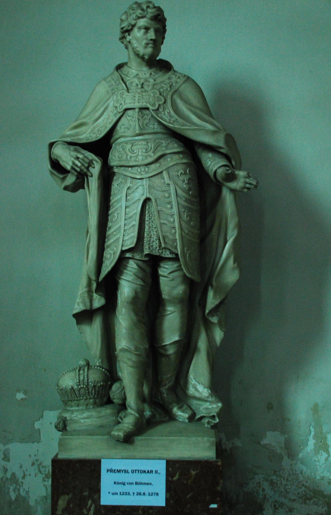 Statue Ottokar Przemysl in der Minoritenkirche in Wien